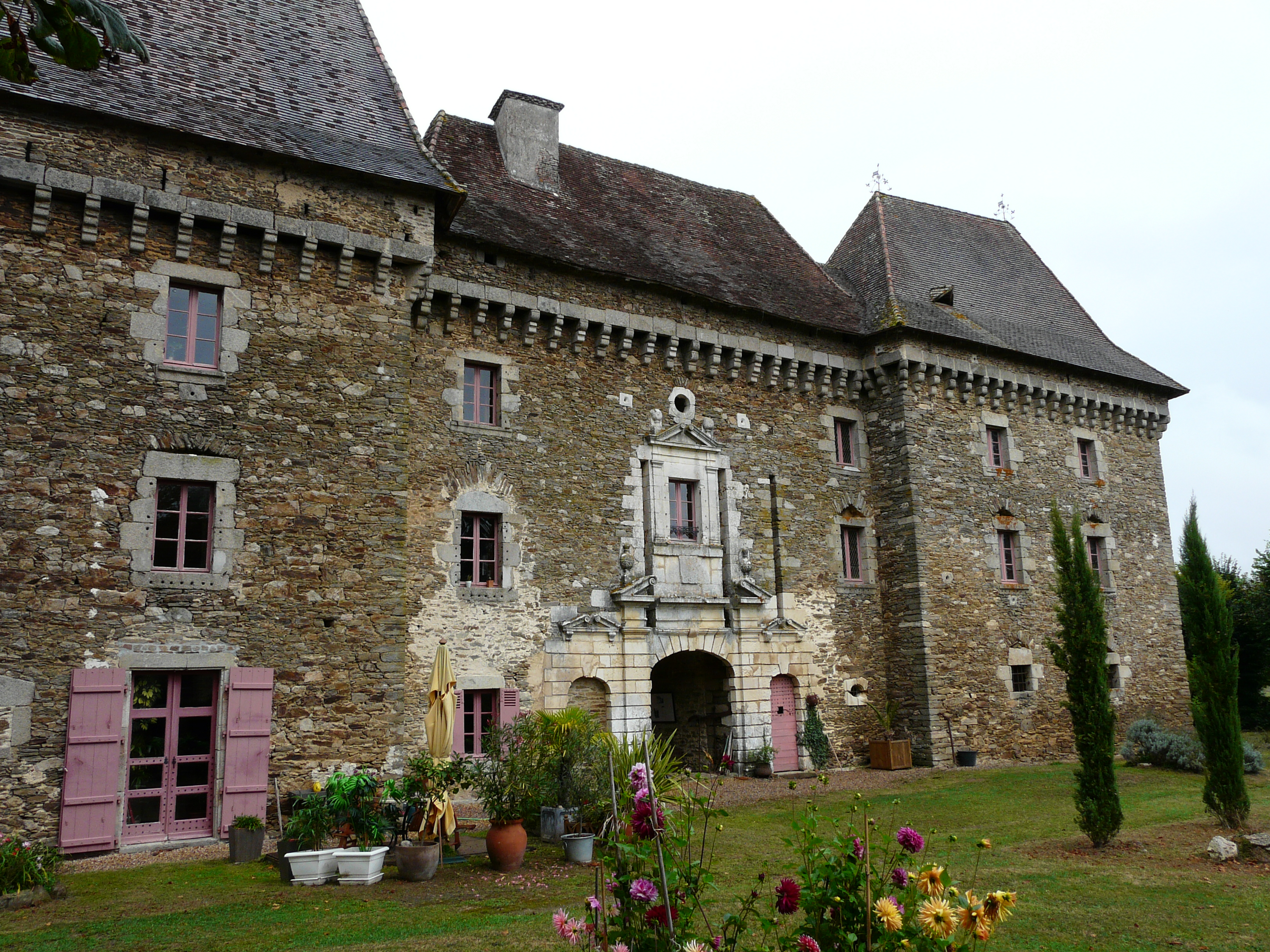 Le logis sud-ouest du château de Frugie, Saint-Pierre-de-Frugie, Dordogne, France